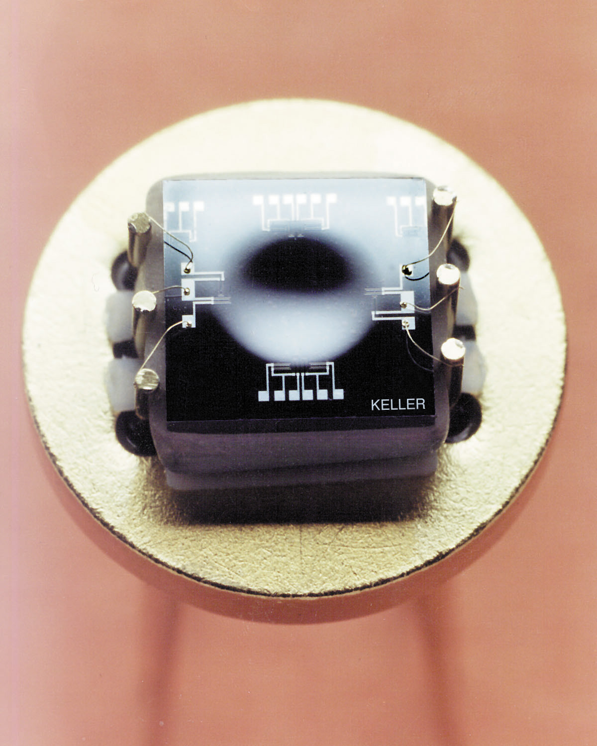 Silizium-Druckmesszelle